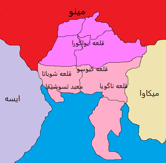 Provinces of Japan-Owari 1555